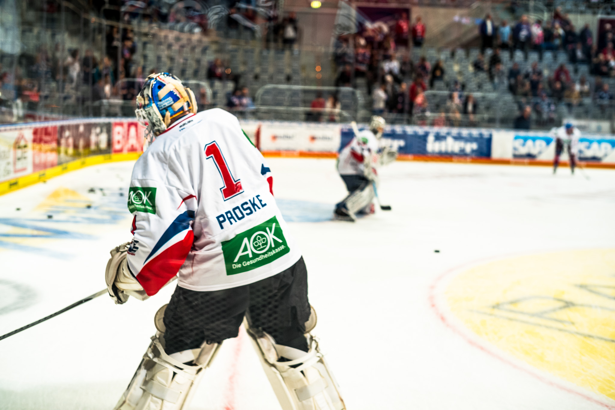 adler-1001531